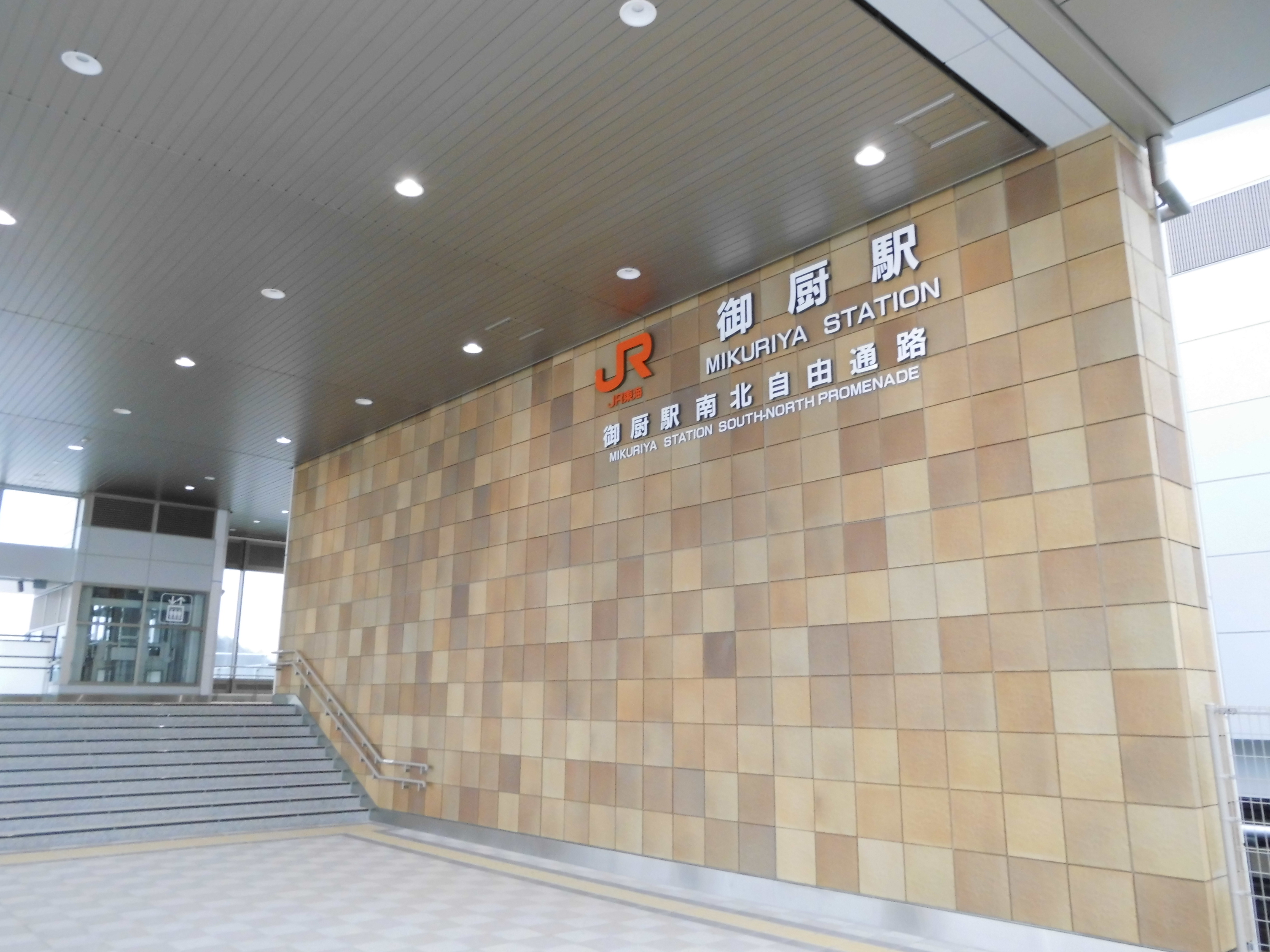 令和2年３月１４日に開業した東海道線の御厨駅北口